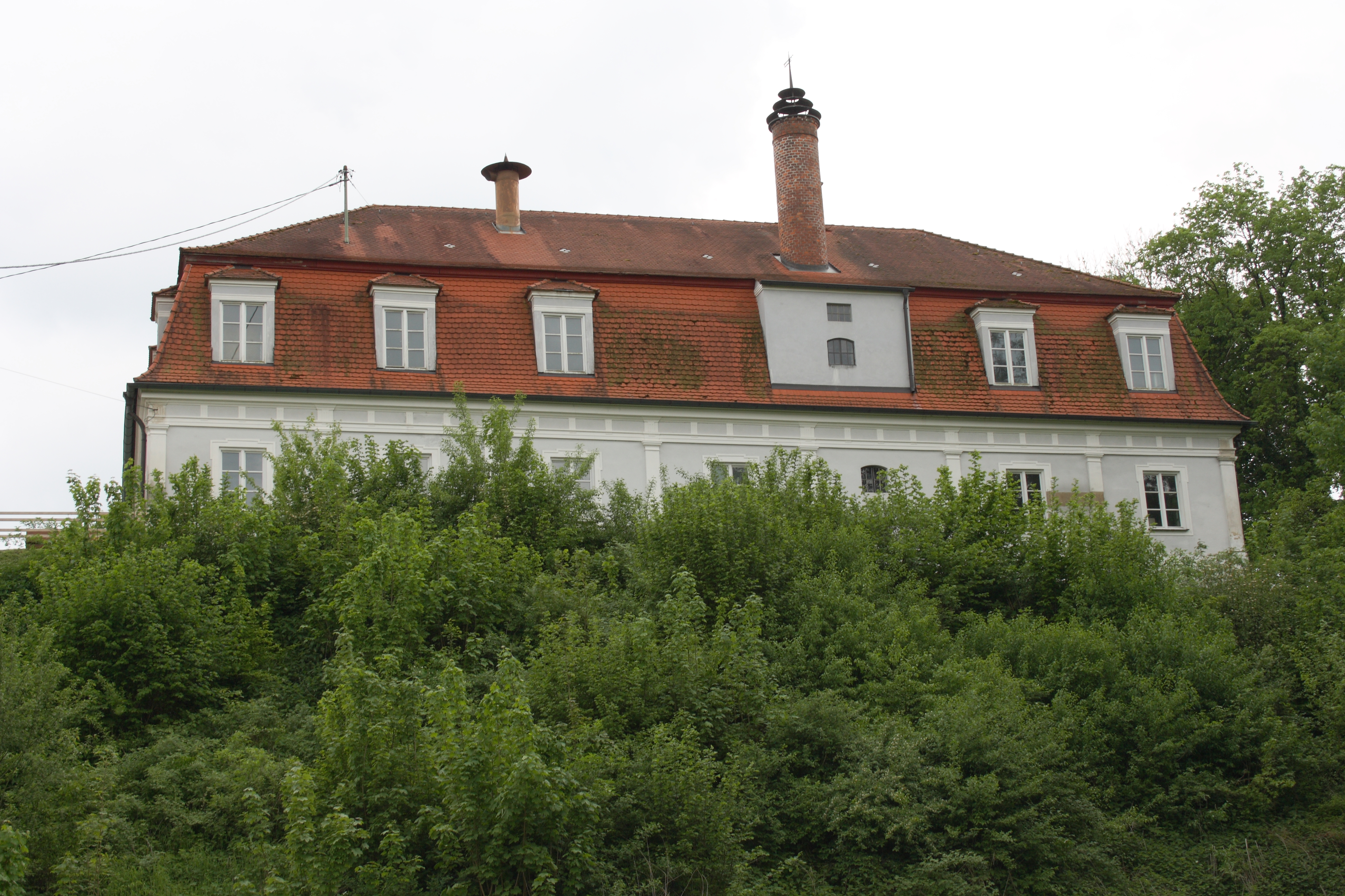 Katholische Kapelle St. Alexander in Harthausen, einem Ortsteil von Rettenbach im Landkreis Günzburg (Bayern), St.-Alexander-Straße 11